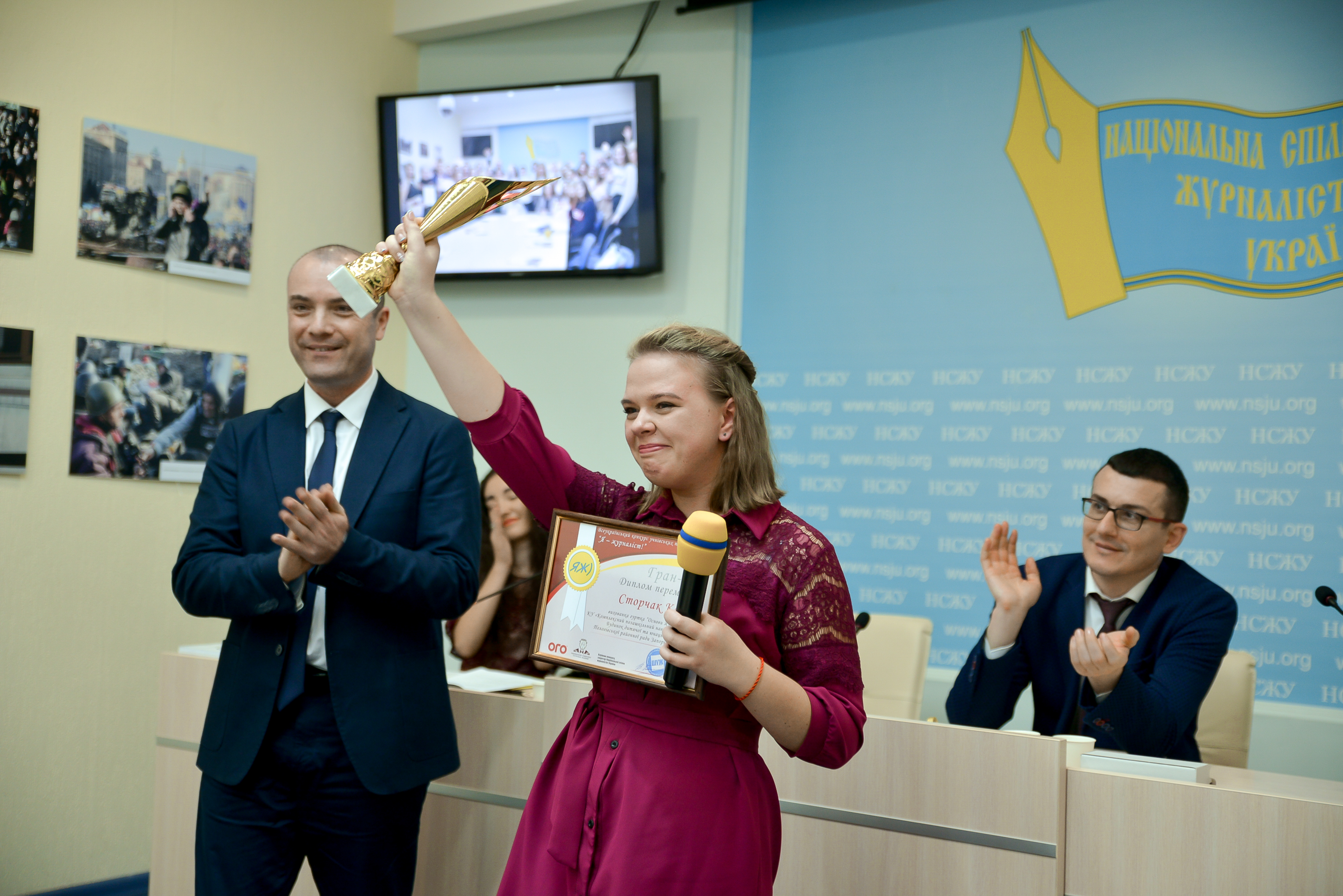 Фото зроблено у Києві, у Спілці журналістів України, де у складі переможців нагороджували учнів нашого Хмелівського ліцею